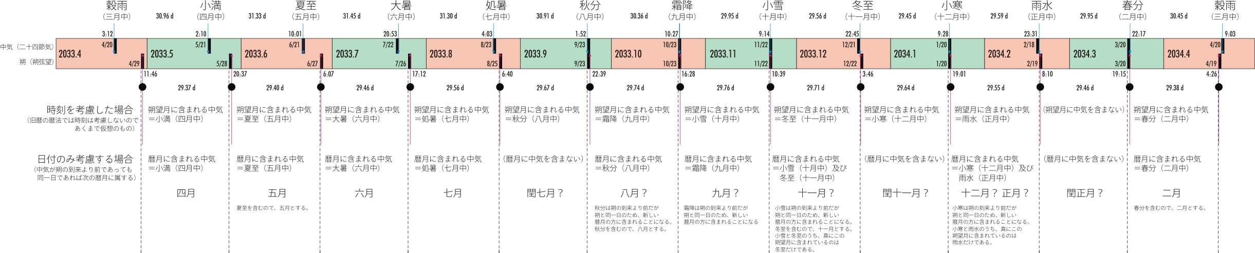 旧暦2033年問題における朔と中気の日取りとタイミング